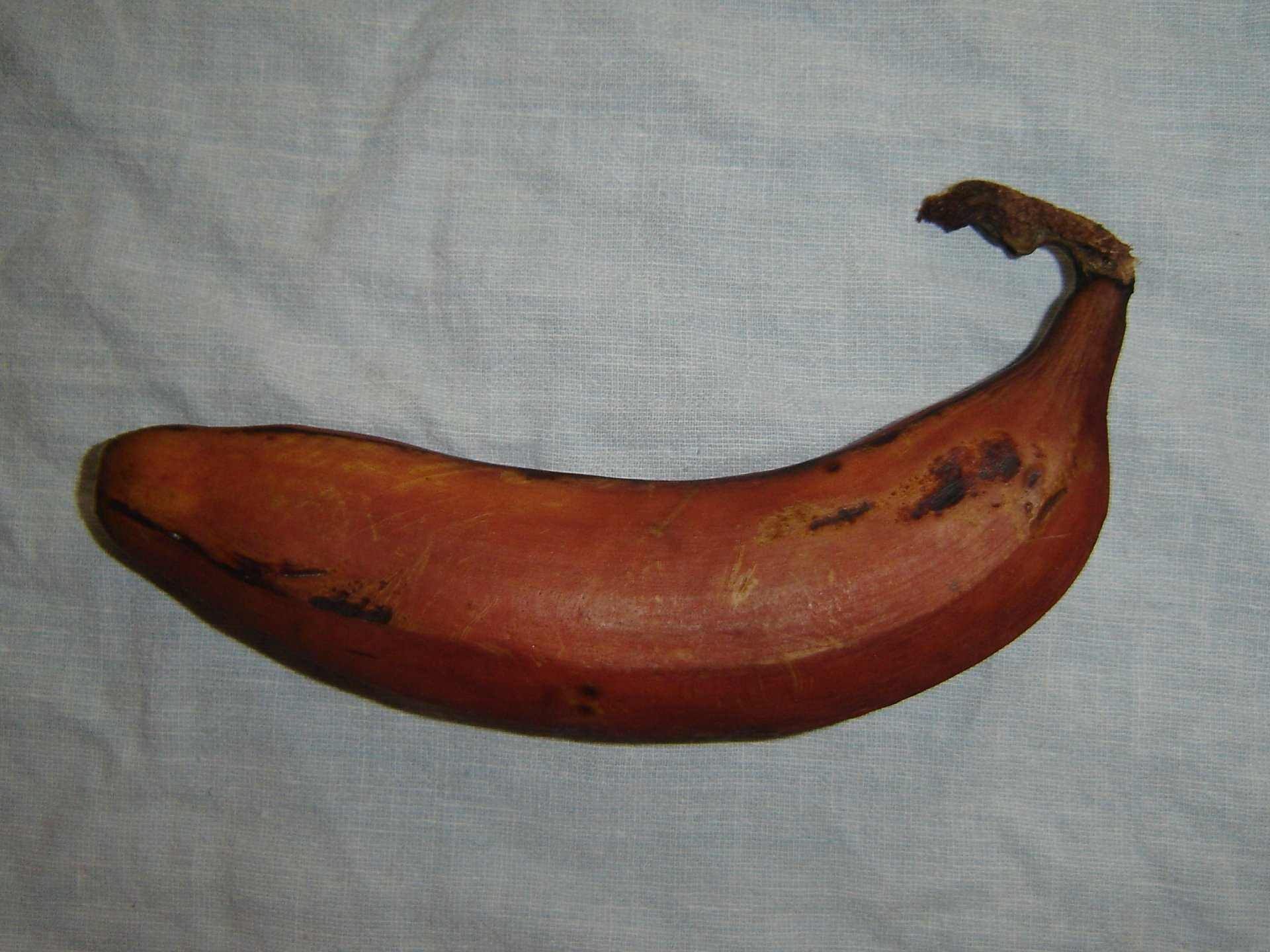 Eine reife Banane Rose